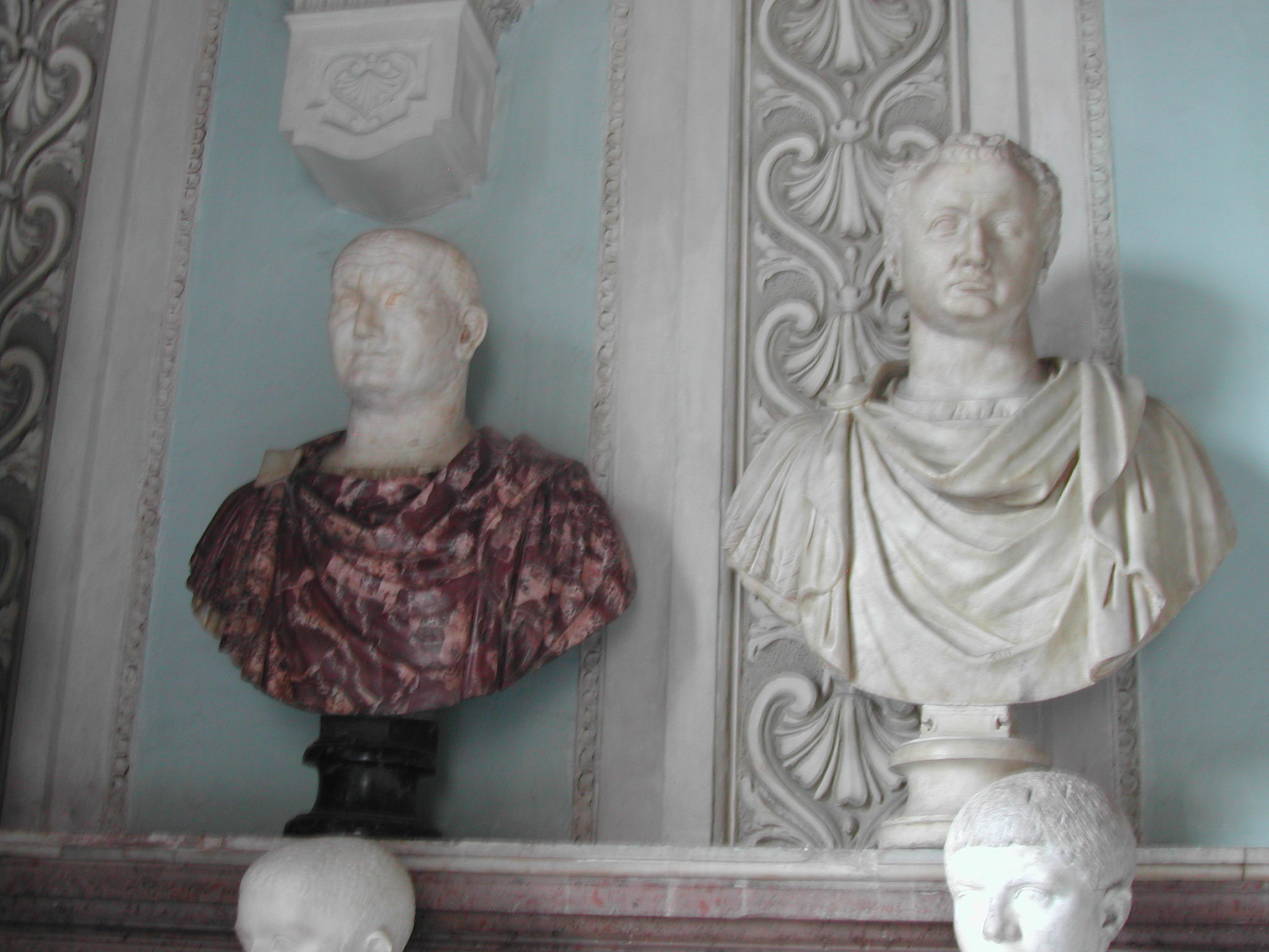 Bustos de los emperadores romanos Vespasiano (izquierda) y Tito (derecha). Museo Capitolino, Roma.